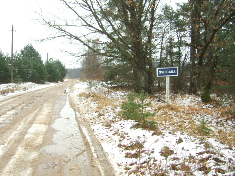 Šveicarų kaimo prieigos